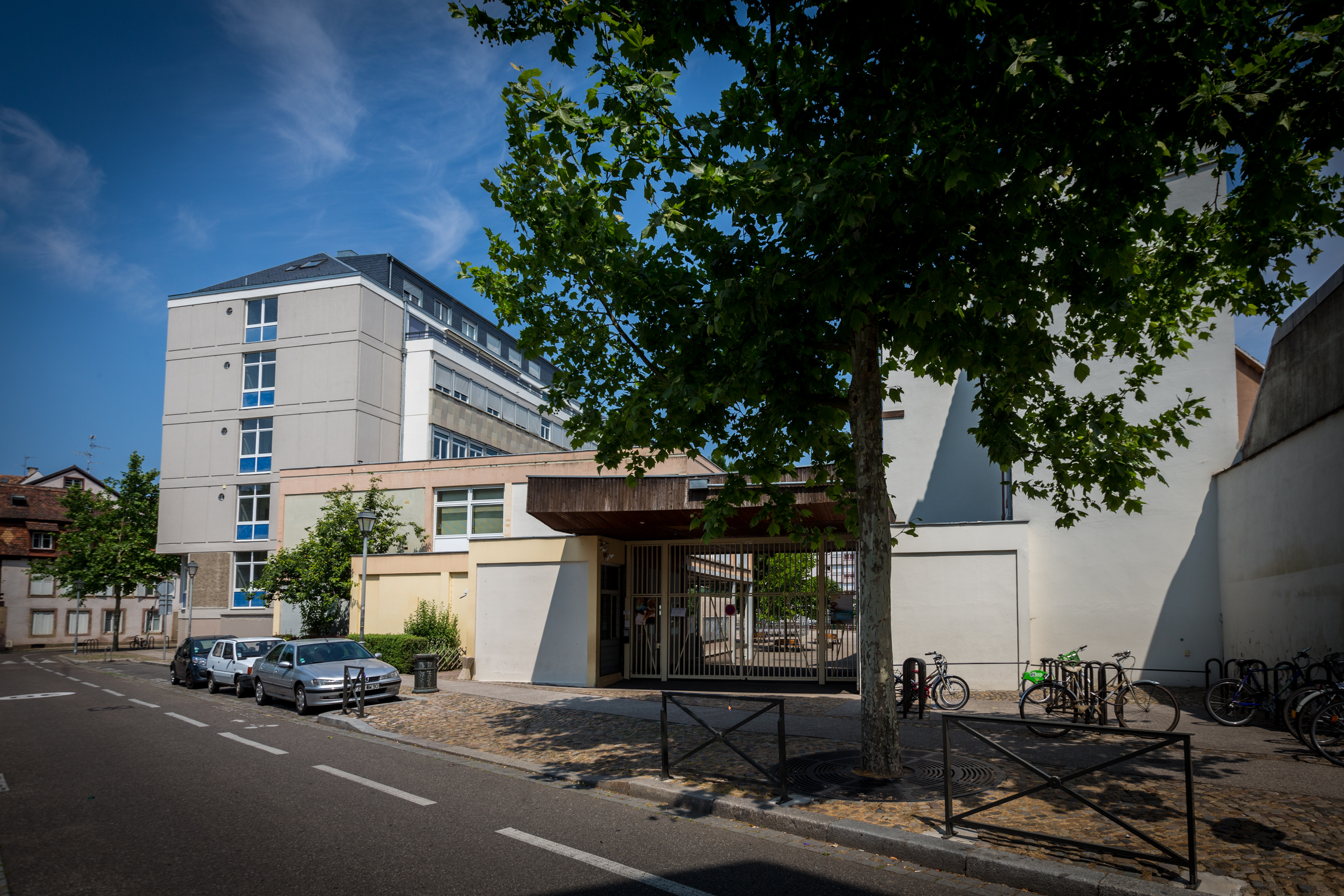 Le collège Lucie-Berger Strasbourg en juin 2015